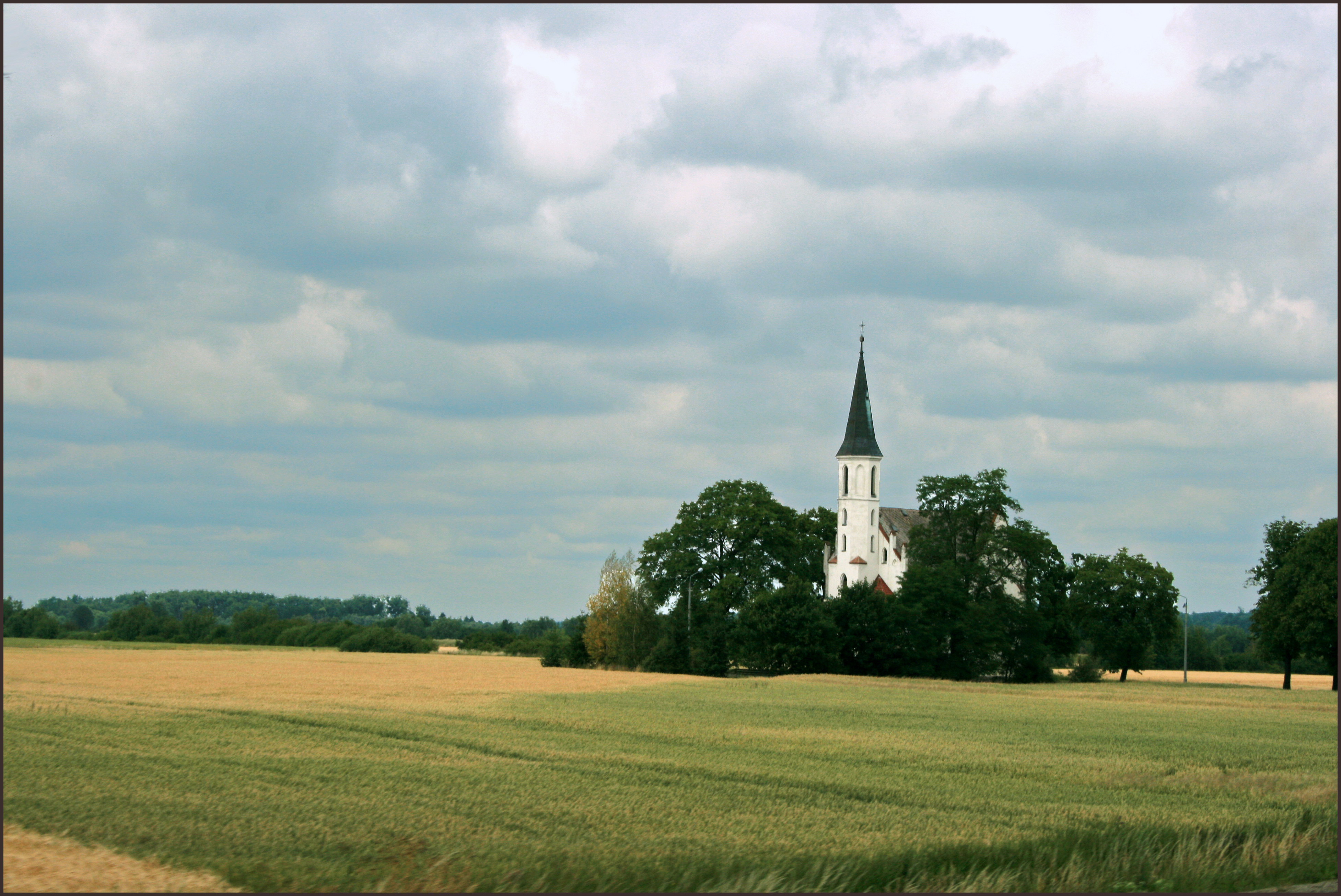 Skoroszyce church